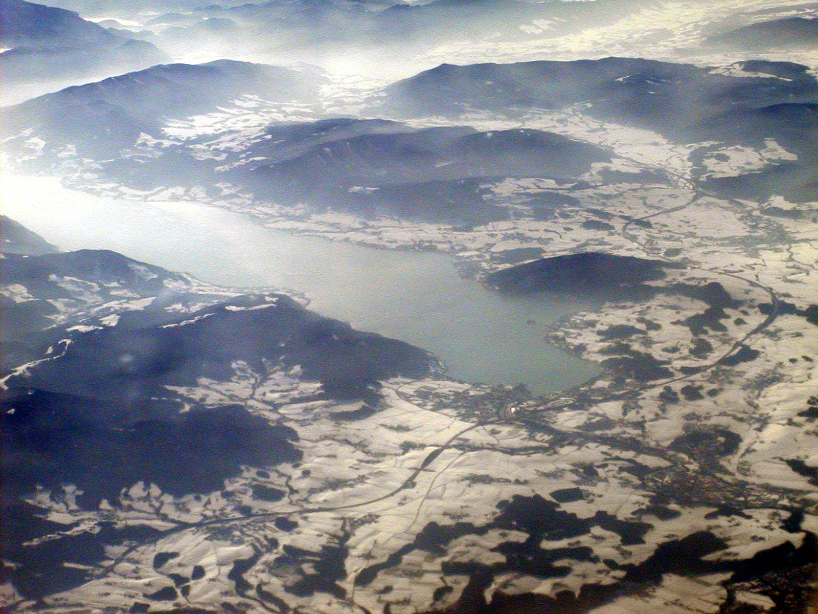 Salzkammergut-Attersee-Luftaufnahme-2004-aus ca 9000m Höhe